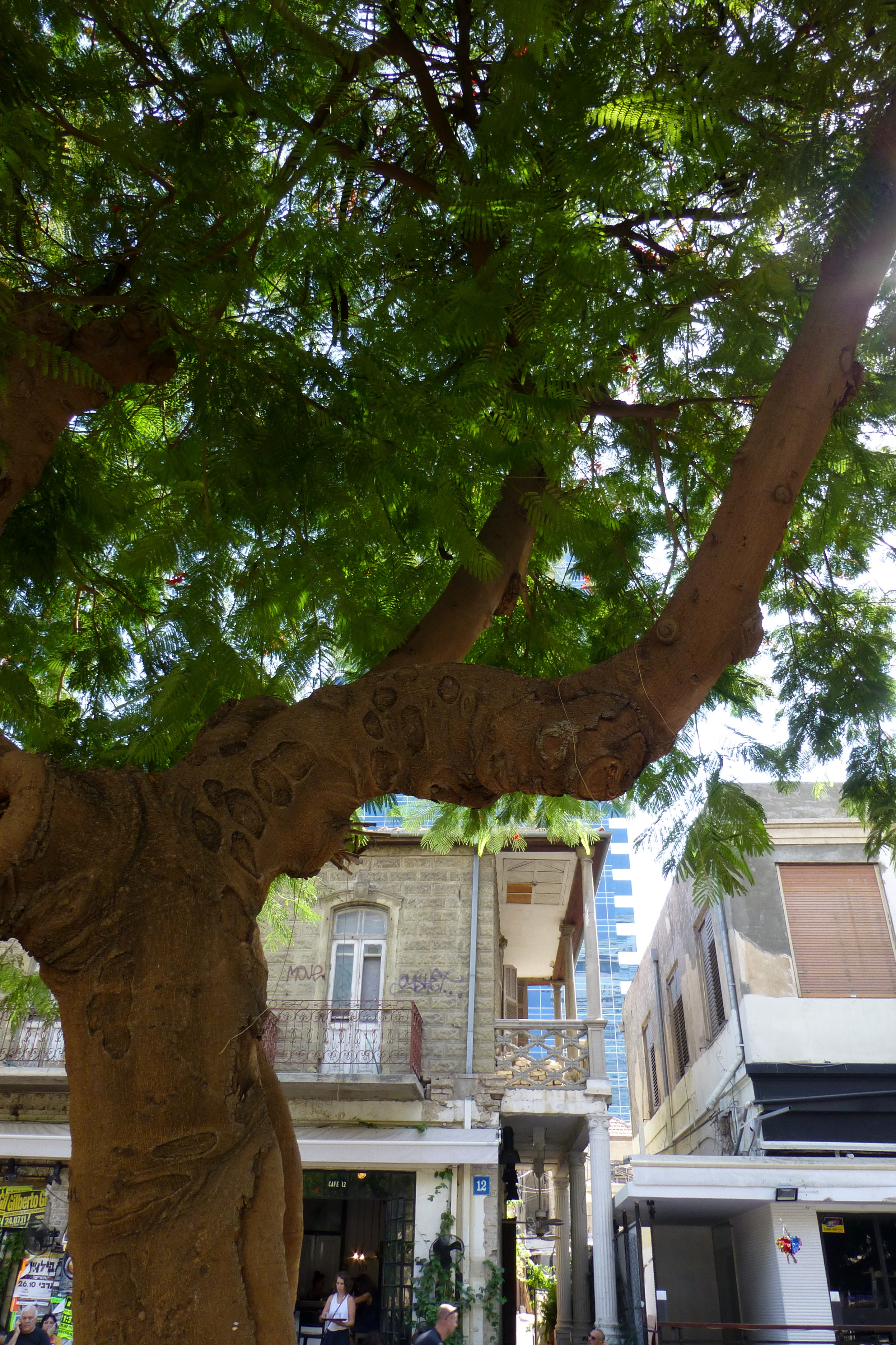 אברהם פוגל היה מראשוני 'אחוזת בית' בתל אביב הקטנה. הבית, שנבנה ב 1939, ברחוב רוטשילד, עדיין לא שופץ או שומר והוא מציג מבנה בית מקורי מן הבתים הראשונים בתל אביב. כיום יש במקום פאב. בחזית הבית מופיעה כתובת קיר המציגה גרפיטי של מחתרת האצ"ל, שנכתב בשנות ה-1940. פוגל עצמו נרצח ב 1939 והרצח לא פוענח עד היום.